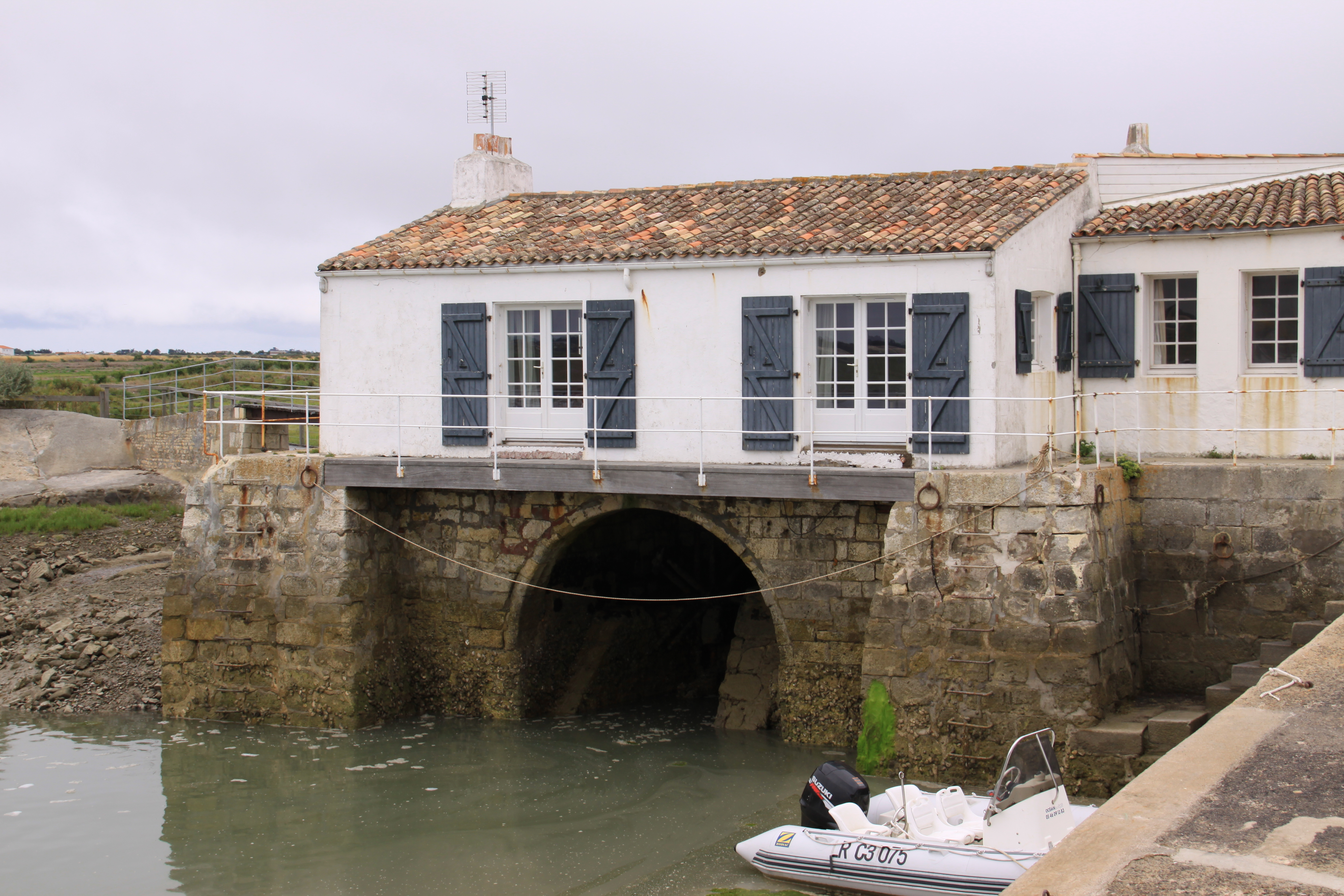 Le moulin à marée situé au port de Loix-en-Ré est plus généralement un moulin à eau. La force du courant de l' eau de mer lors des marées sert de force motrice dans les deux sens (marée montante et marée basse). Ce moulin a eu plusieurs fonctions: moudre la farine, laver du sel. Il sert encore aujourd' hui, grâce au courant qui peut être créé à marée basse avec la réserve d'eau dans les terres, au nettoyage du chenal d' accès au port. C' est le principe de la chasse d' eau. Le moulin à marée est propriété privée. La roue à aube du moulin à marée de Loix n’ est pas située le long d’ un des côtés du bâtiment. Elle est de petite dimension et a été placée sous le moulin, à l’intérieur d’ une cavité cylindrique dans laquelle l’ eau s’ engouffre. Loix-en-Ré, Île de Ré, Charente Maritime, France.